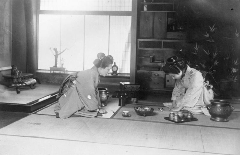 " 5 Uhr-Tee " in Japan ! Die Teezubereitung in Japan wird heute noch nach altüberlieferter Tradition vorgenommen. Die Aufnahmen zeigen die feierliche Stimmung einer Tee-Zeremonie beim "5 Uhr-Tee" in Japan. Feierliche Begrüssung zweier Japanerinnen in einem Teehaus. Der Tee-Raum hat in seiner Grösse genau vorgeschriebene Formen und ist im ruhigen Stil ausgestattet.